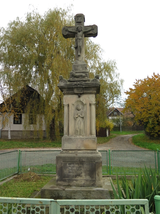 Sloup se sochou ukřižovaného Krista, Dolní Rokytňany.